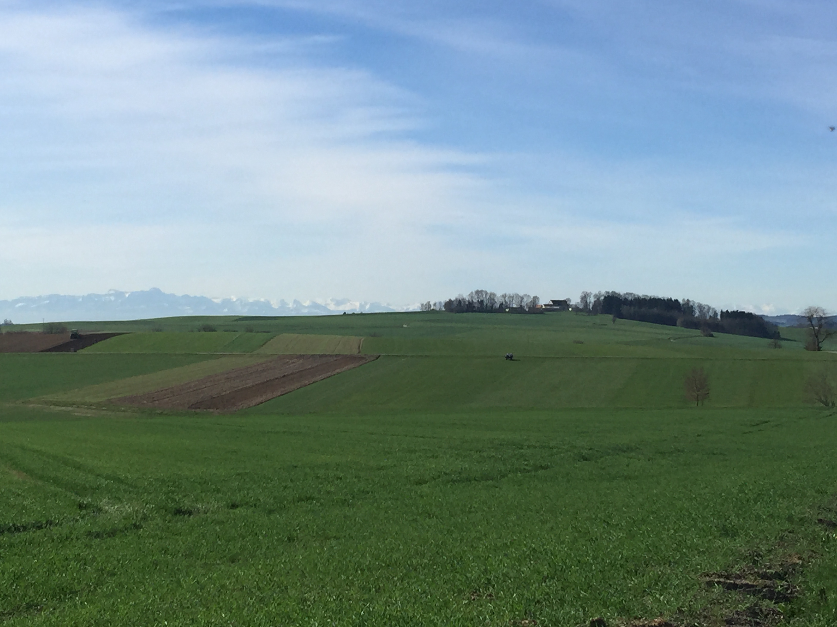 Der Berg Buchschoren beim Pfullendorfer Stadtteil Aach-Linz, links im Hintergrund der Säntis in der Schweizer Alpen.